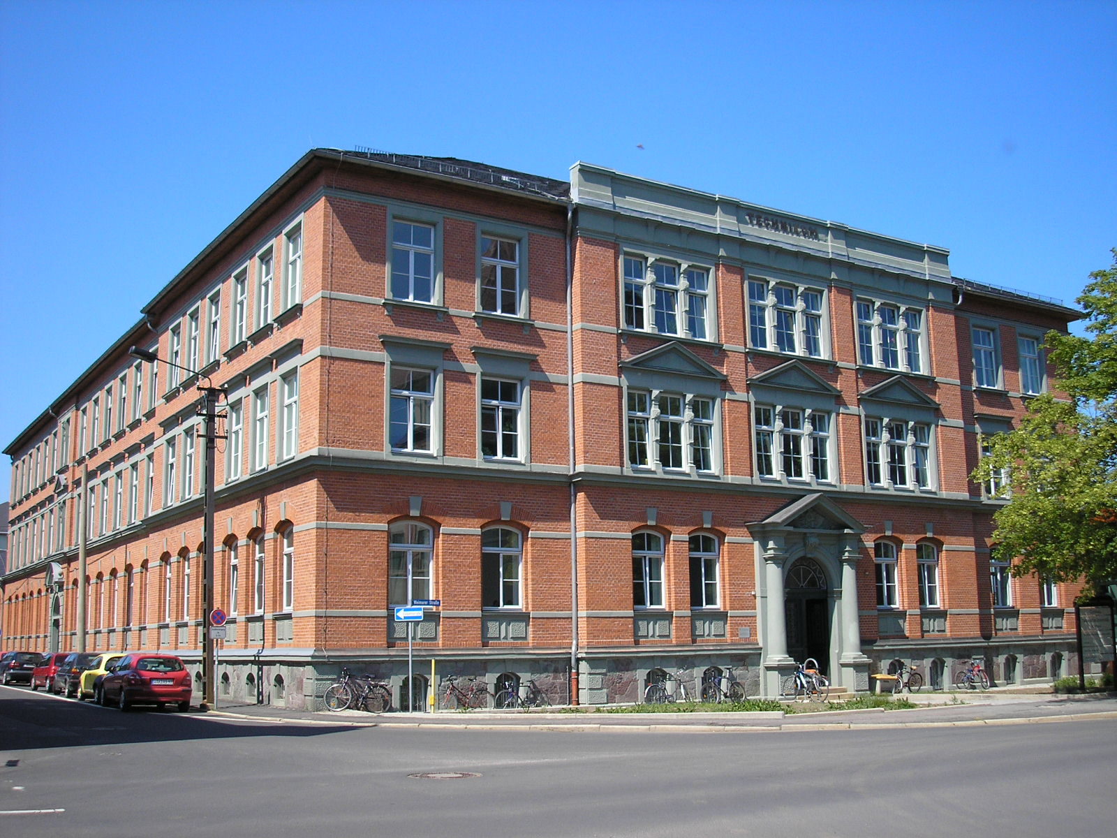 Das Technikum in Ilmenau (erbaut 1894), Grundstein der heutigen TU.